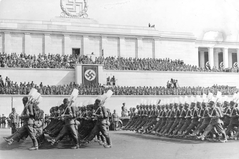 Nürnberg, Reichsparteitag, RAD-Parade Reichsparteitag 1937. Der große Aufmarsch der 38 000 Arbeitsdienstmänner vor dem Führer. a[uf].d[em]. Zeppelinfeld [Nürnberg.- Reichsparteitag der NSDAP, "Reichsparteitag der Arbeit", Parade von Männern des Reichsarbeitsdienstes mit geschultertem Spaten vor Adolf Hitler im Auto stehend, 6.-13. September 1937] Abgebildete Personen: Hitler, Adolf: Reichskanzler, Deutschland